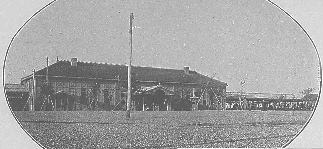 説明文に「富山市の正北に在り明治四十一年婦負郡櫻谷村より移転せるものにして北陸線中最も新式の構造をなせるものなりと云ふ」とあり。